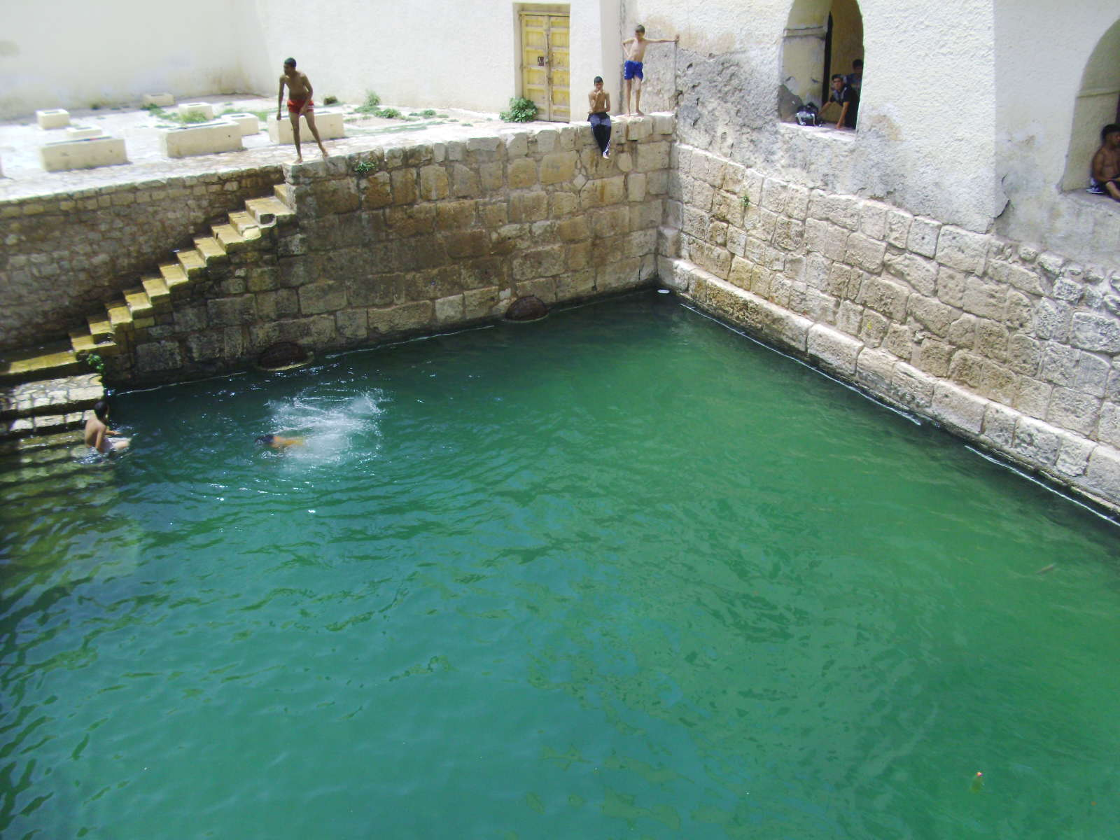 Piscine romaine à Gafsa (Tunisie)